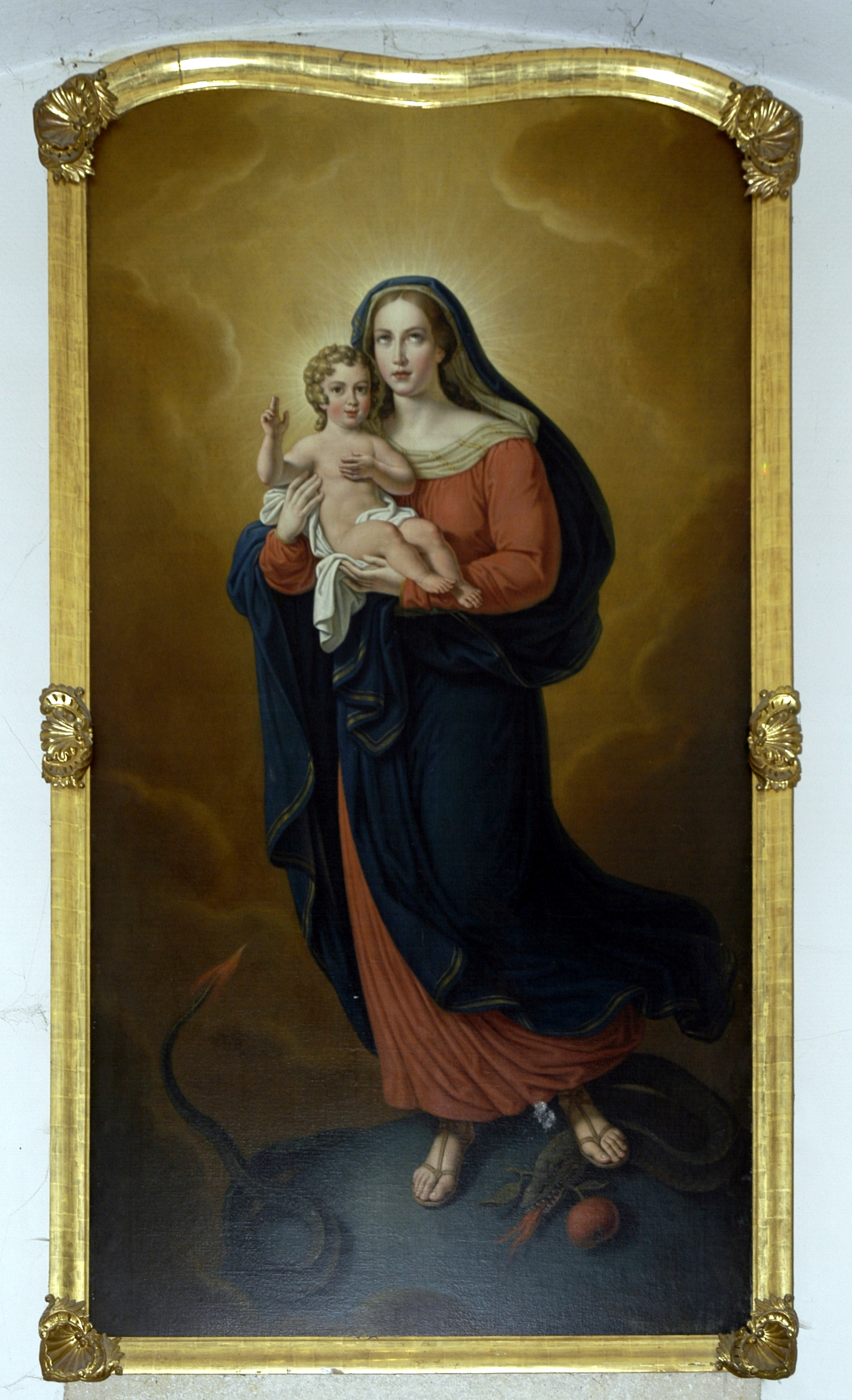 Gemälde "Maria mit dem Kinde" von Johann Höfel, welches sich ursprünglich am Hochaltar befand.